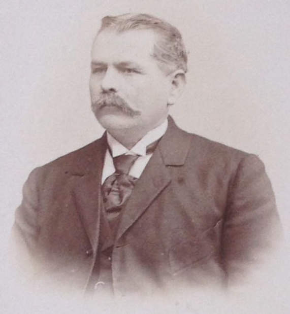 Foto von Emil Oskar Schulz, Brauereigutsbesitzer und Stadtrat, 1846-1927